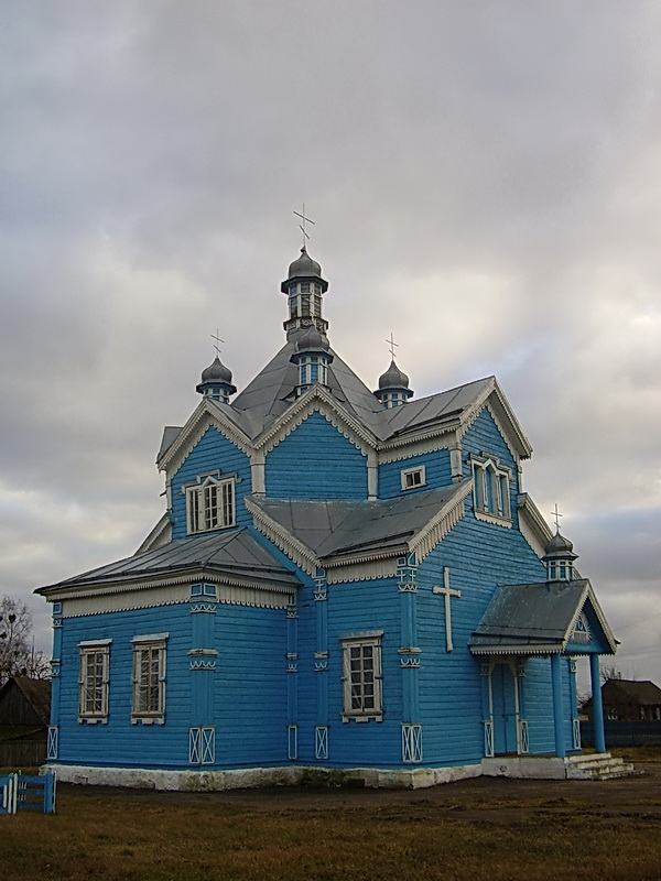 Кунаса. Дабравешчанская царква